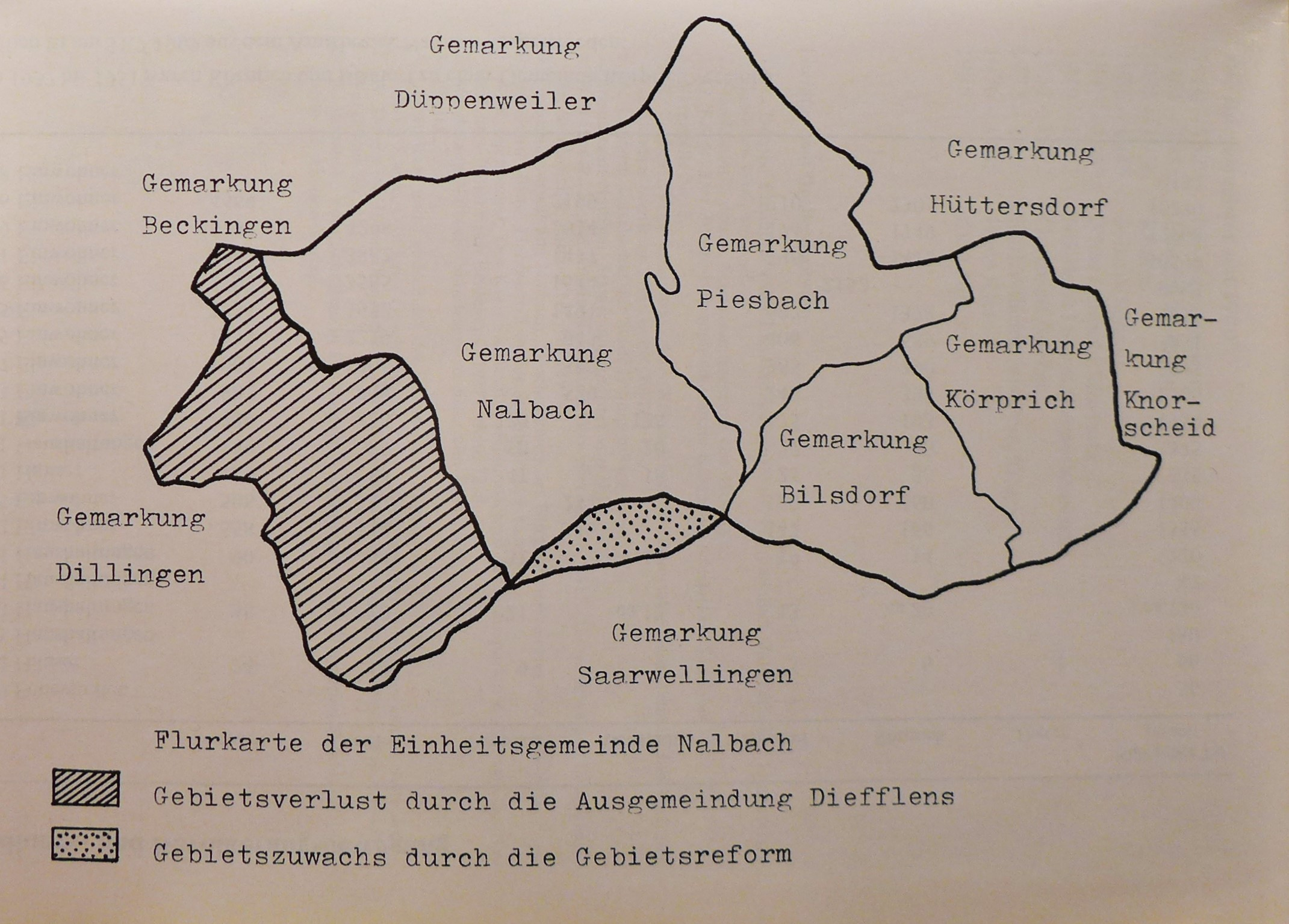 Gemarkungen des Nalbacher Tales: Das schraffierte Gebiet bezeichnet die Gemarkung Diefflens, die am 1. August 1969 nach Dillingen ausgemeindet wurde. Das punktierte Gebiet (Bahnhofsviertel) wurde von der Gemeinde Saarwellingen am 1. Januar 1974 an die Gemeinde Nalbach abgetreten. (Handzeichnung von Georg Colesie: Geschichte des Nalbacher Tales, Eine saarländische Heimatgeschichte, 2. Auflage, Nalbach 1990, S. 185.)